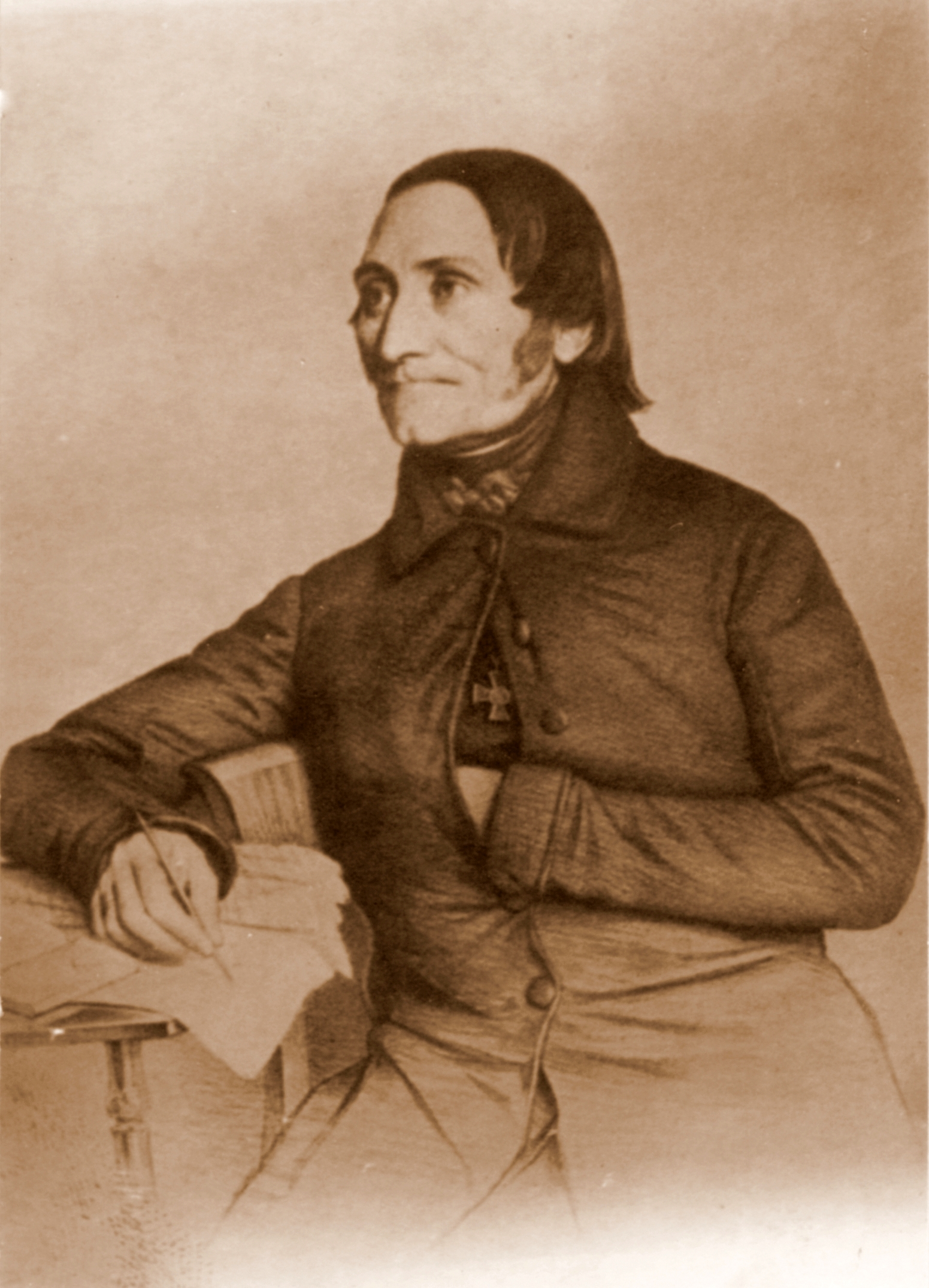 Portrait des Landtagsabgeordneten Johannes Schuchard (1782-1855)aus Barmen.